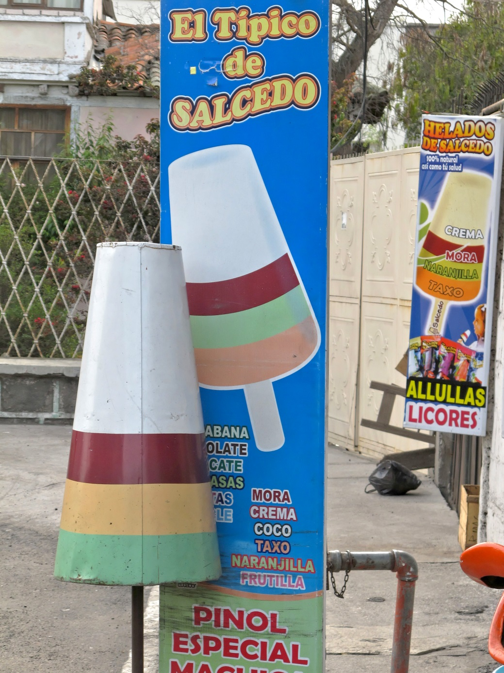 Ice Cream in Salcedo, Ecuador